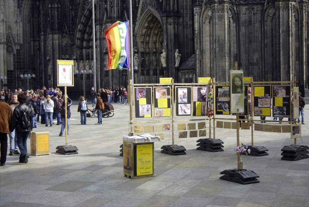 Bildbeschreibung: Klagemauerprotest gegen atomare Rüstung 2006 Quelle: eigenes Foto... Fotograf/Zeichner: bodoklecksel 16:45, 5. Mai 2006 (CEST) Datum: April 2006 Sonstiges: ...